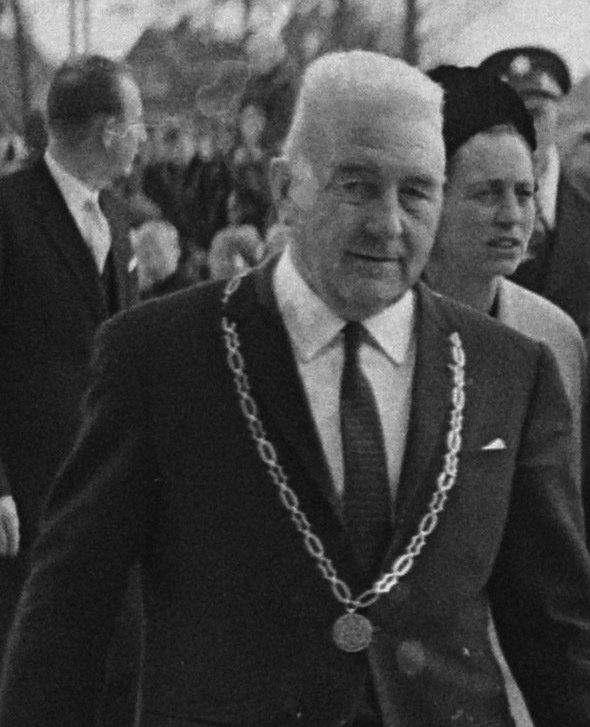 Prinses Christina opende ijsstadion "Thialf" te Heerenveen. Prinses Christina bij aankomst. Naast haar burgemeester H. Huisman van Heerenveen